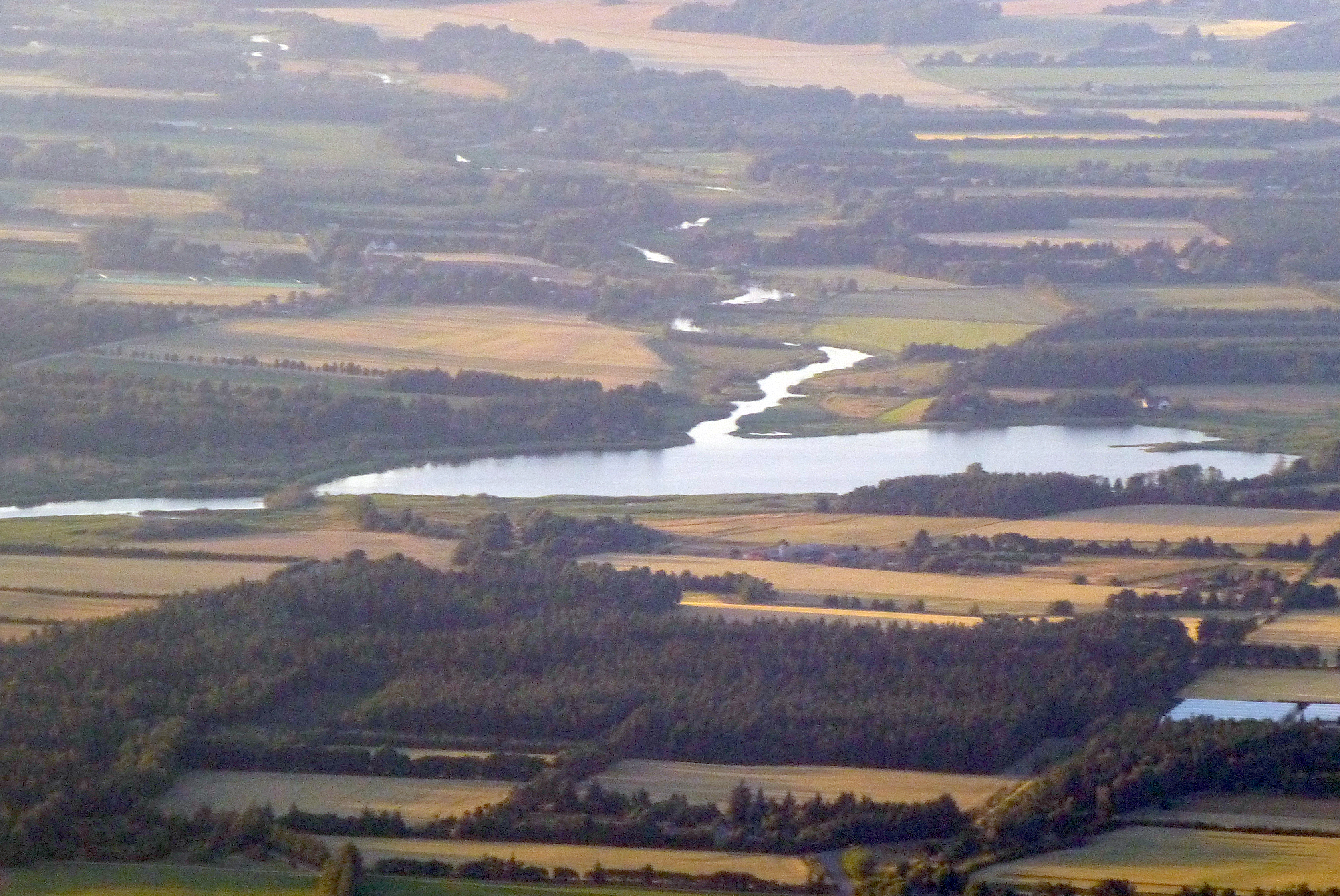 Sminge Sø og Gudenå set mod nord